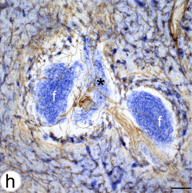 Fig 2. Visualización de vainas alrededor de los capilares de la Pulpa Roja, positivas para CD271+, conectadas a la red peri-folicular de tres folículos. (h) ROI 3: teñida para células endoteliales de los senos/sinusoides de la pulpa roja con CD34 (marrón) y para fibroblastos con CD271 (azul). Se muestran dos folículos en azul (f) y una parte de un vaina linfática periarterial (PALS) en marrón entre ambos folículos. Los capilares internos surgen de una arteria central en el PALS (asterisco). El CD271 está más fuertemente expresado en células estromales de la vaina capilar. Las células dendríticas foliculares (FDC) en los folículos, las células de retículo fibroblástico (FRC) en una vaina linfática periarterial (PALS) y los fibroblastos intersticiales ubicuos también son positivos. Superposición de 24 secciones consecutivas registradas. Barra de escala = 100 μm.